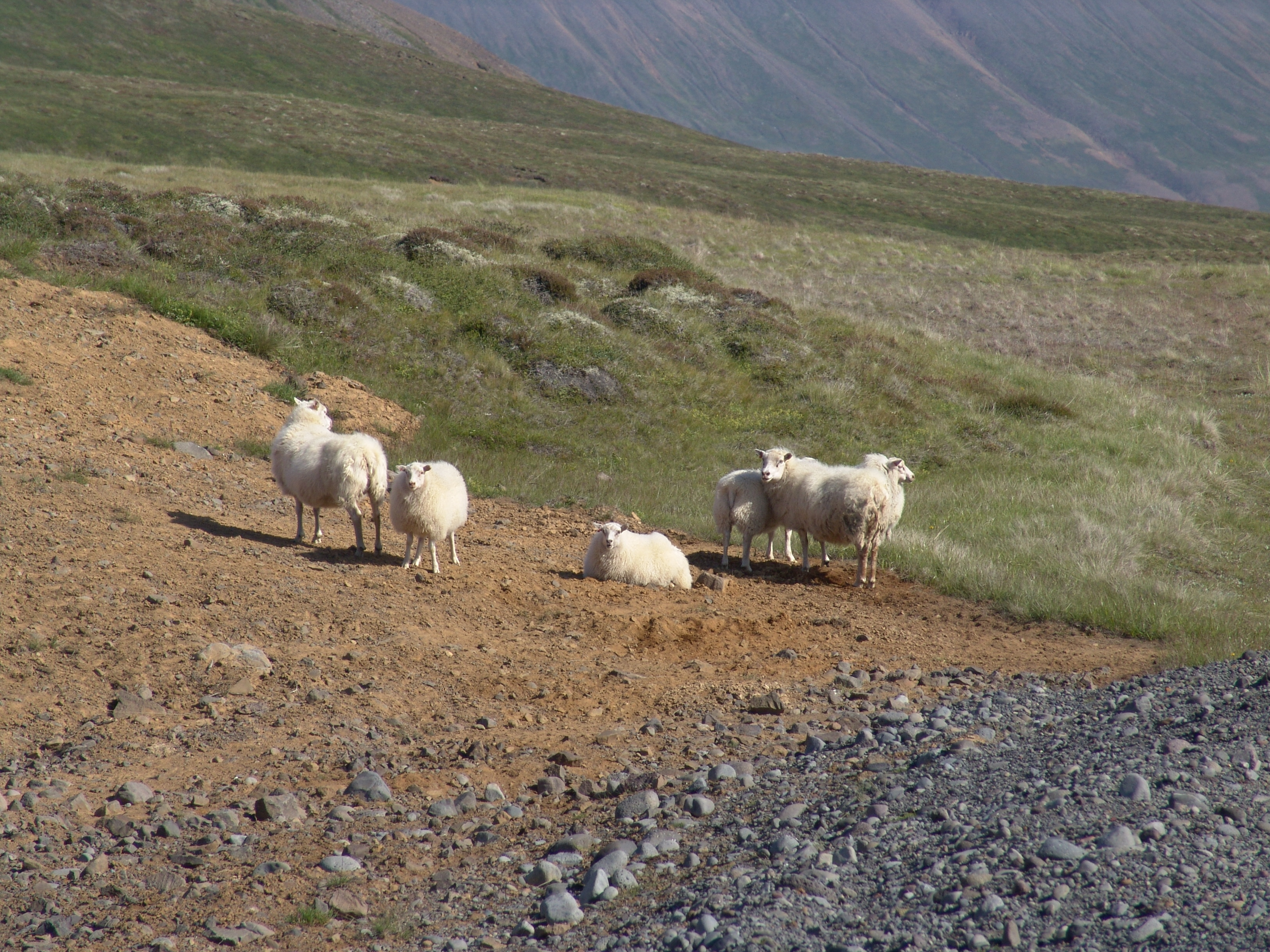 Island, Schafe.